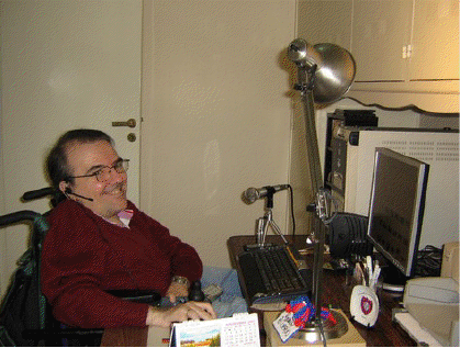 Marcelo Villegas trabajando en su radio